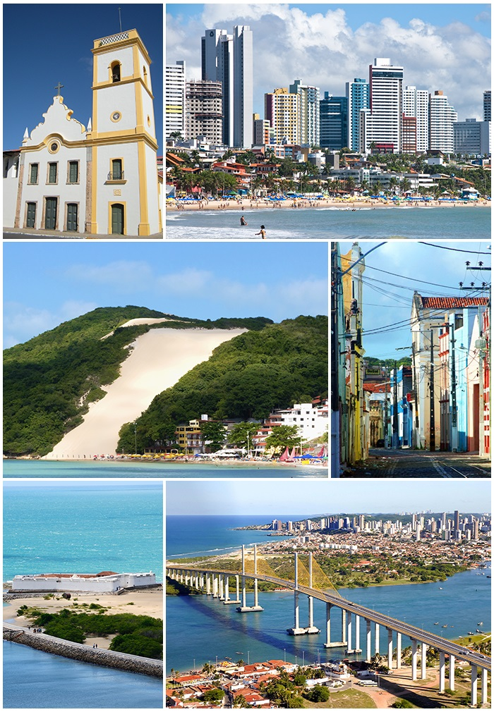 Montagem de fotografias de Natal, capital do estado do Rio Grande do Norte, Brasil.Do topo, da esquerda para a direita: Do topo, da esquerda para a direita: Igreja Matriz de Nossa Senhora da Apresentação, no centro histórico; visão da Praia de Ponta Negra e do bairro homônimo; Morro do Careca; Rua Chile; Fortaleza dos Reis Magos e visão aérea da Ponte Newton Navarro e do Rio Potenji.